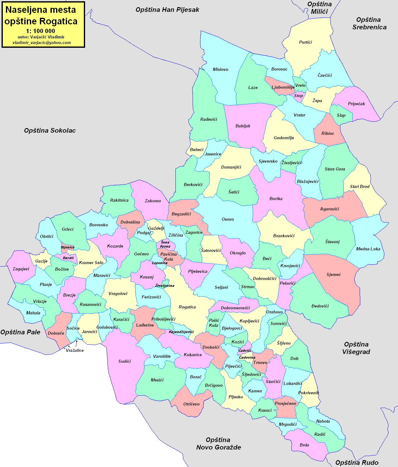 Opština Rogatica